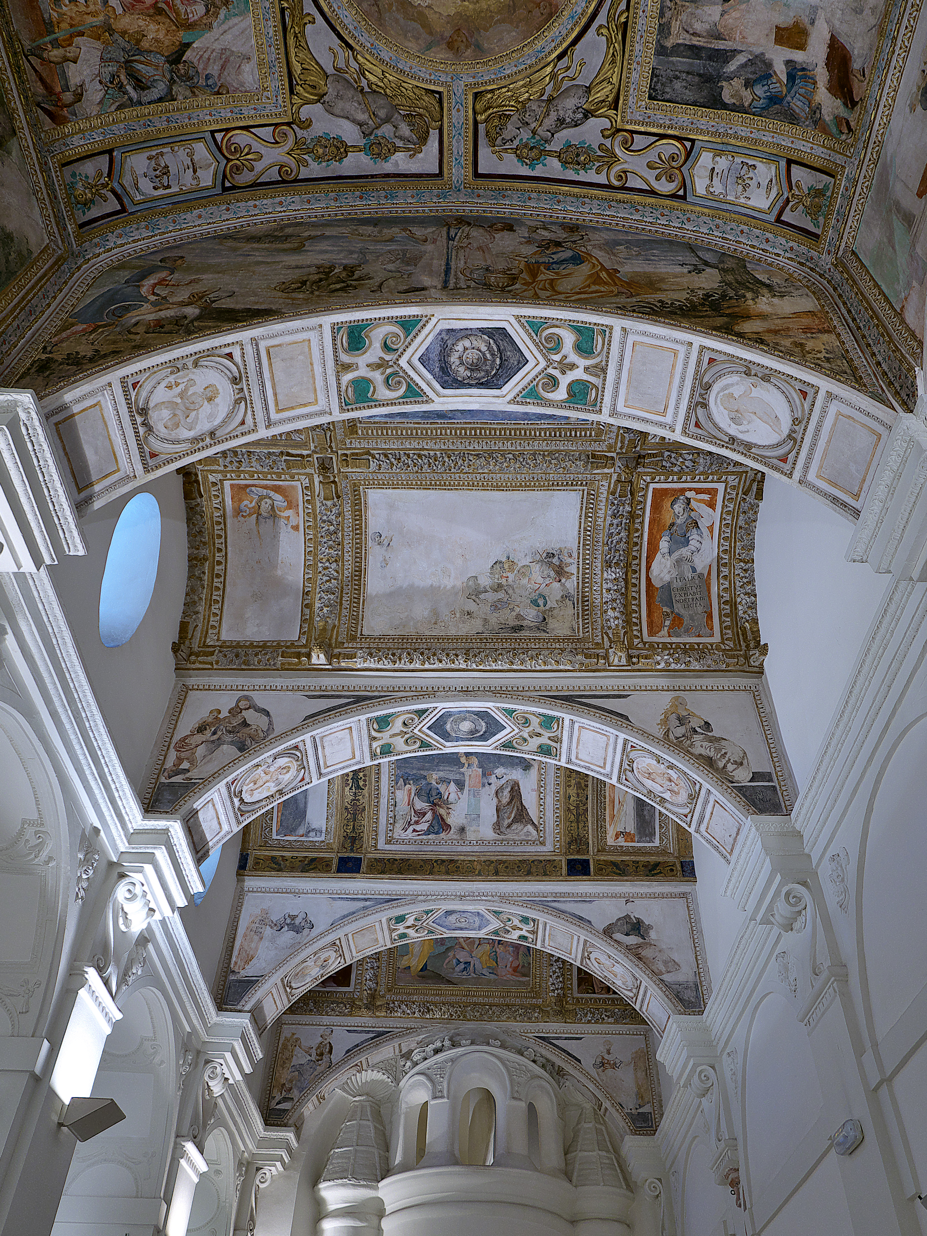 Probablemente, Rómulo Cincinato pinta los frescos de la bóveda del panteón de Luis de Lucena (1538-1540).